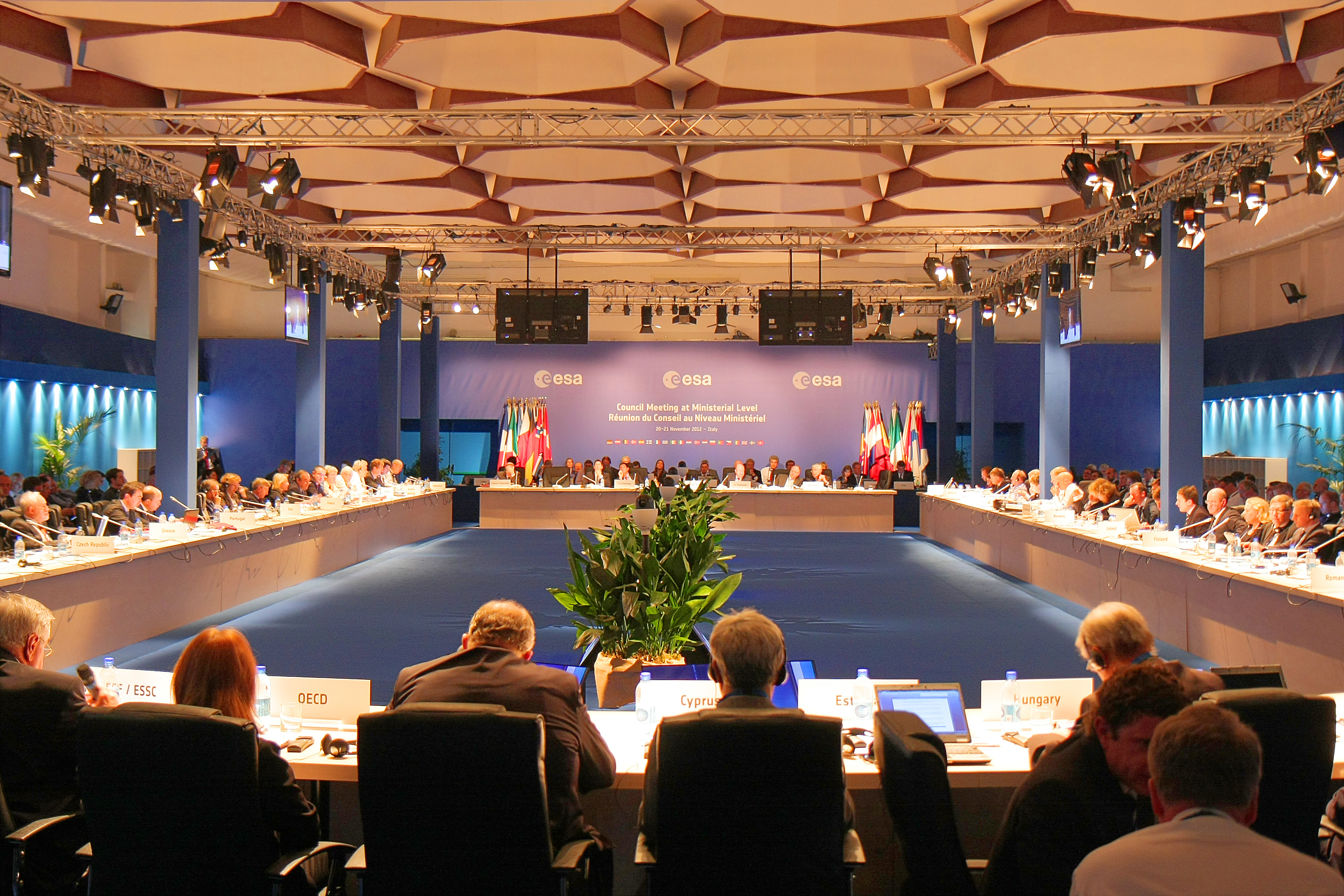 Image: DLR / Thilo Kranz